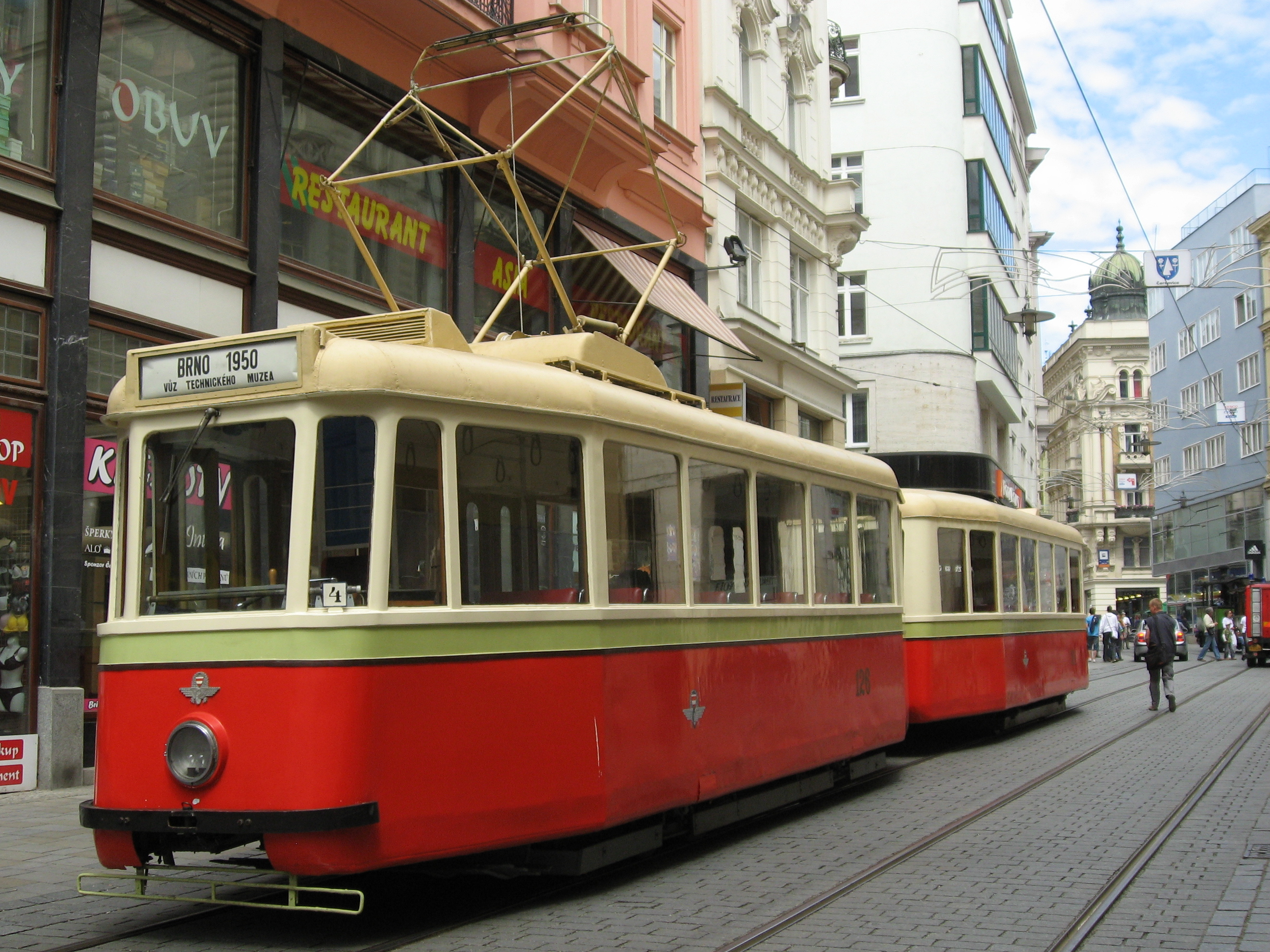 Brno, 140 let MHD